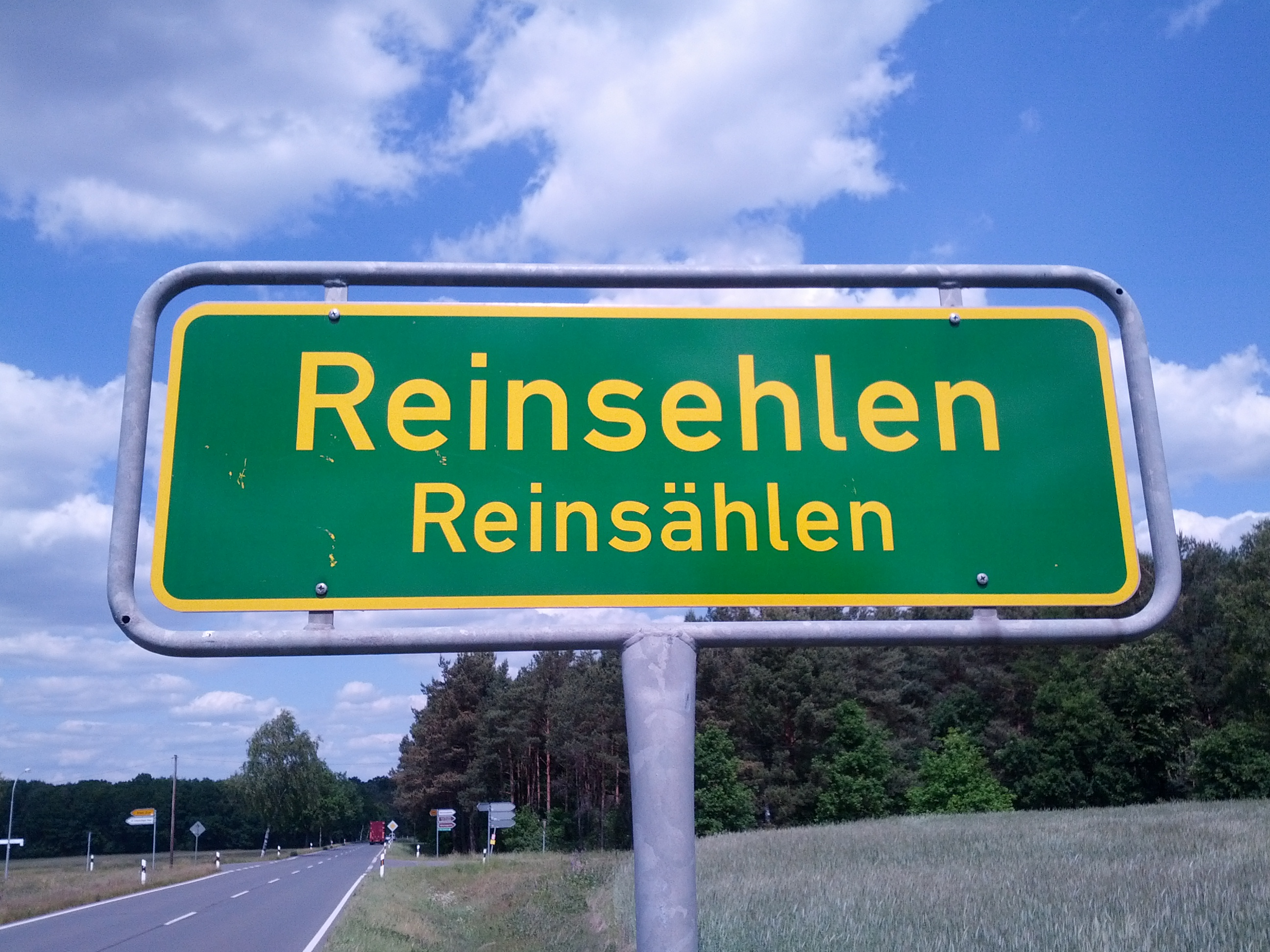 Oortsschild von Reinsählen, Landkreis Heidkreis, mit den Naam op Hoochdüütsch un op Plattdüütsch